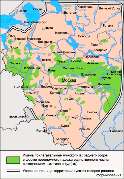 Карта распространения диалектного явления русского языка в области морфологии: имена прилагательные мужского и среднего родов в форме предложного падежа единственного числа с окончанием -ым типа в худы́м. Источники: Захарова К. Ф., Орлова В. Г. Диалектное членение русского языка. — 2-е изд. — М.: «Едиториал УРСС», 2004. — 176 с. — ISBN 5-354-00917-0 — С. 52 (Карта 1.)